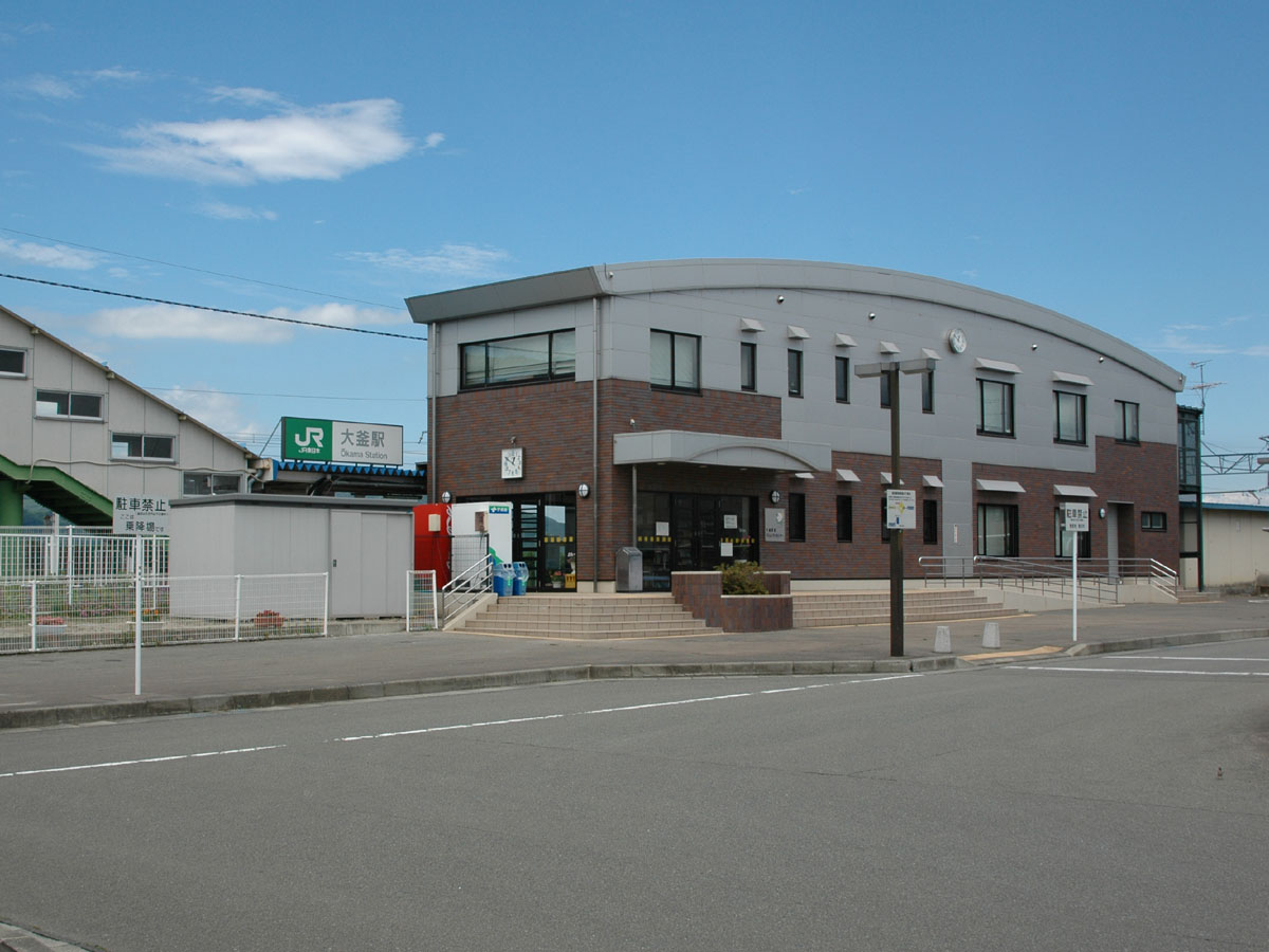 Ōkama Station, Takizawa, Iwate, Japan